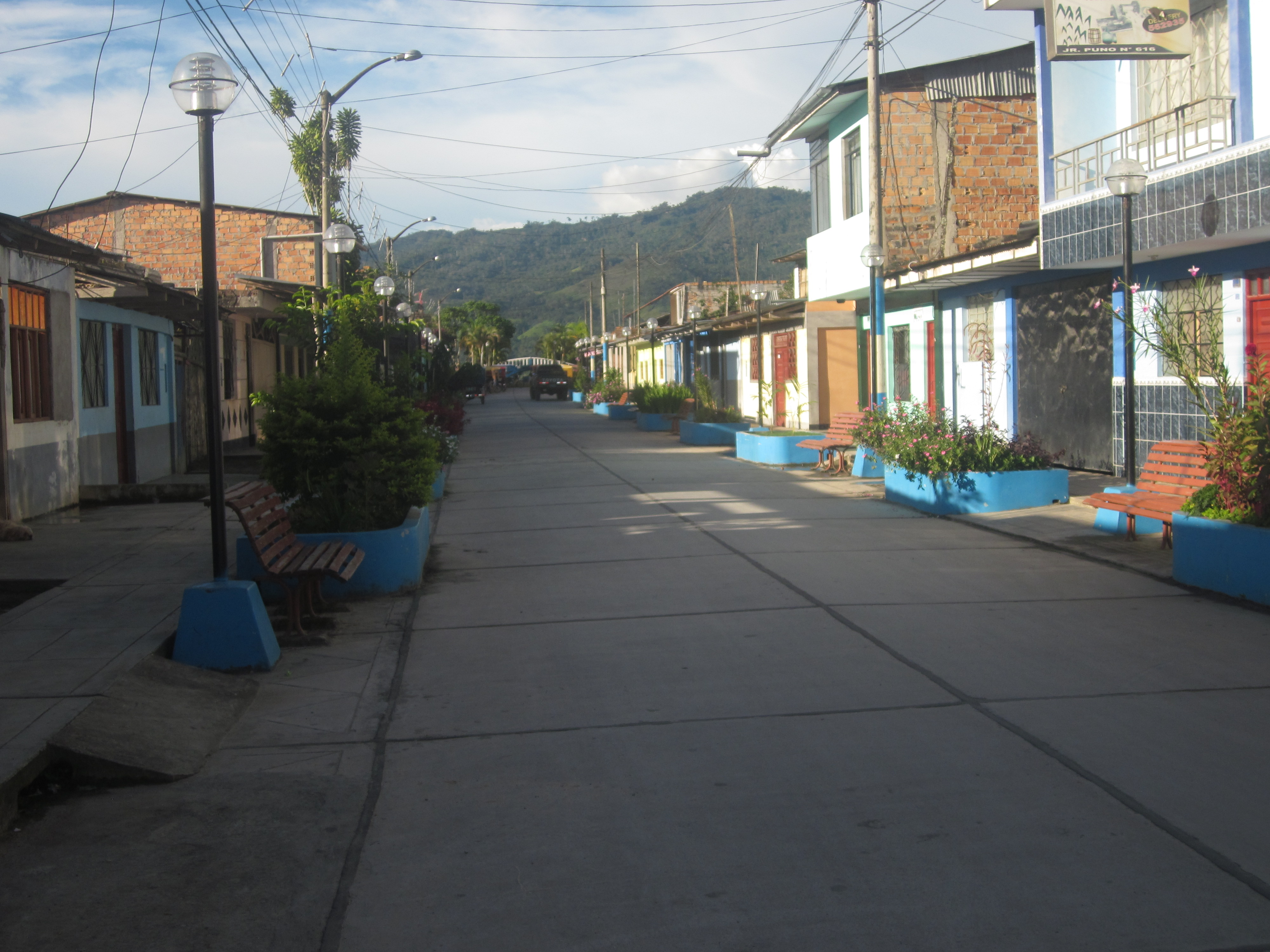 Jr. Puno, entrada a una punta en Moyobamba